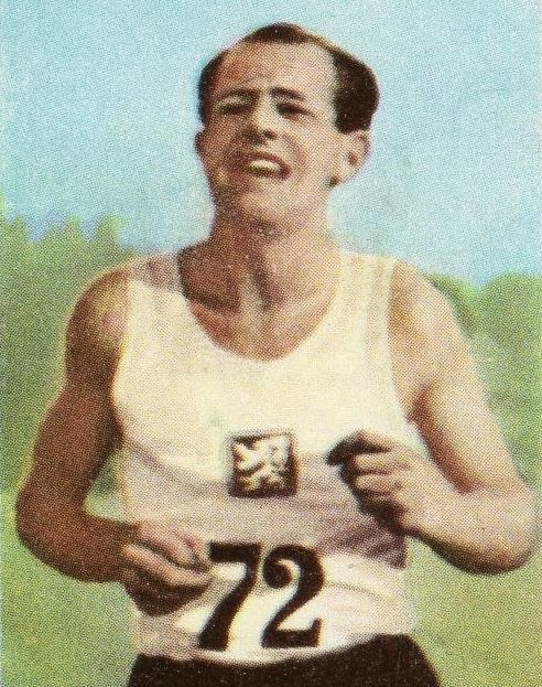 Emil Zatopek au début des années 1950 - Campioni dello Sport 1967-1968, n°65